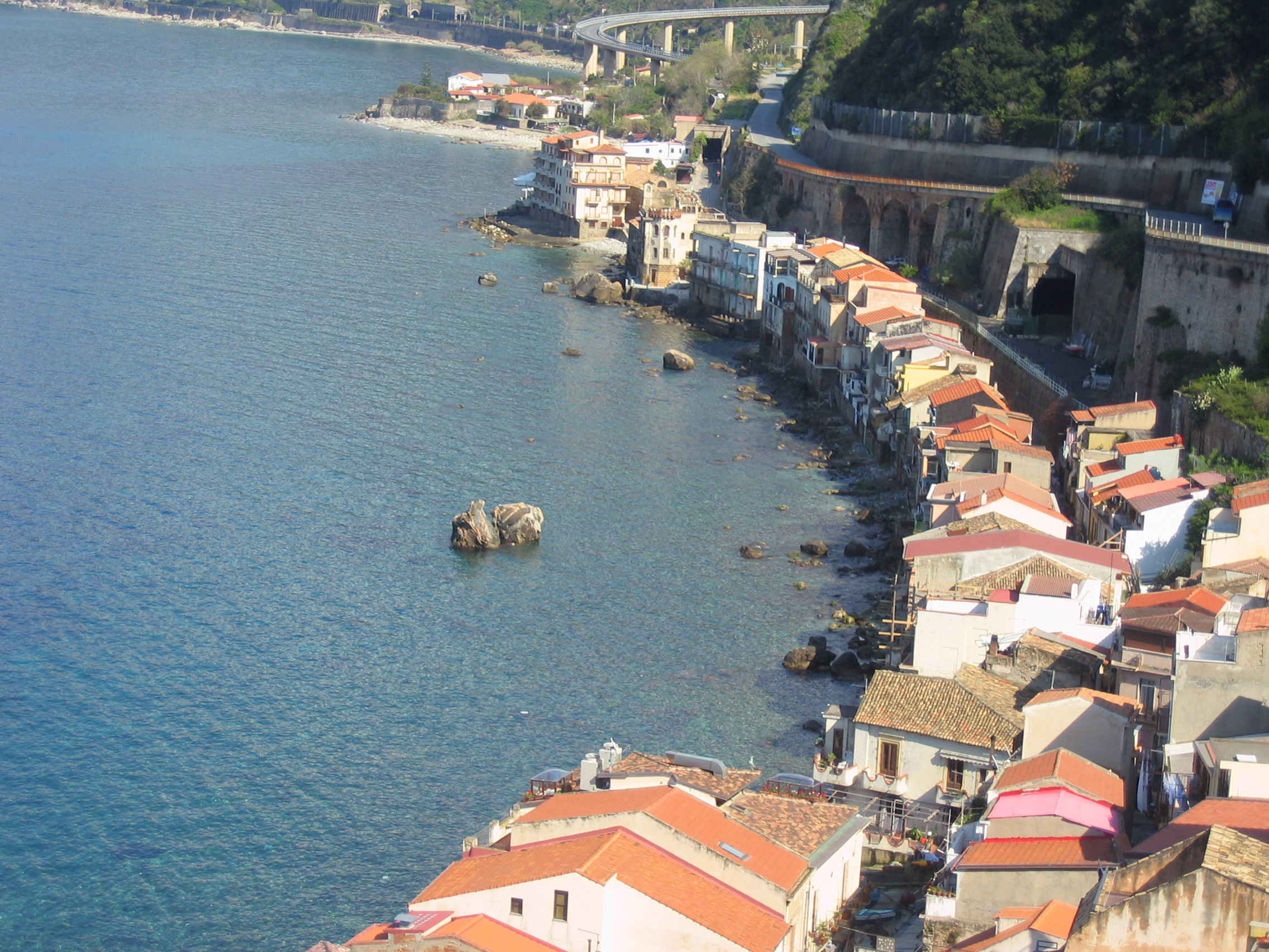 A droite de la citadelle (depuis la mer) la partie de Scilla (Calabre) qui a les pieds dans l'eau.